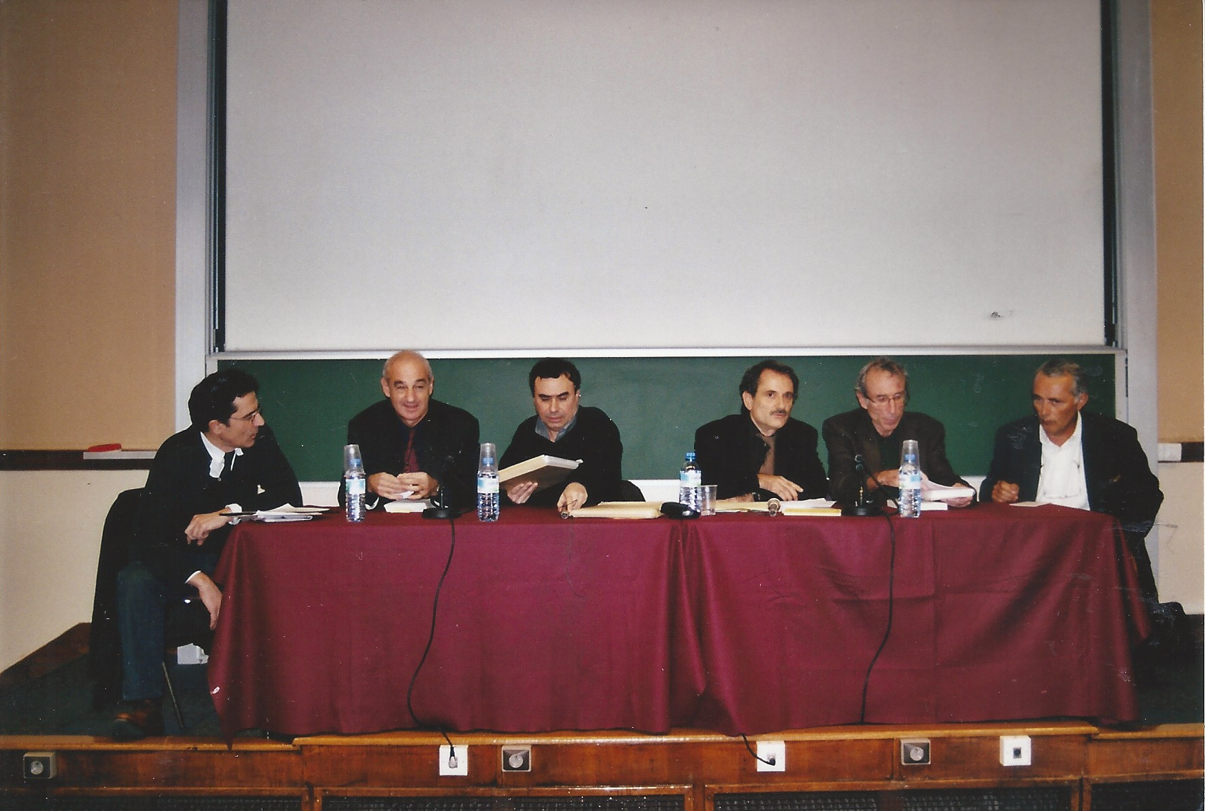 Tribune d'une réunion publique de "Mémoire et Politique"